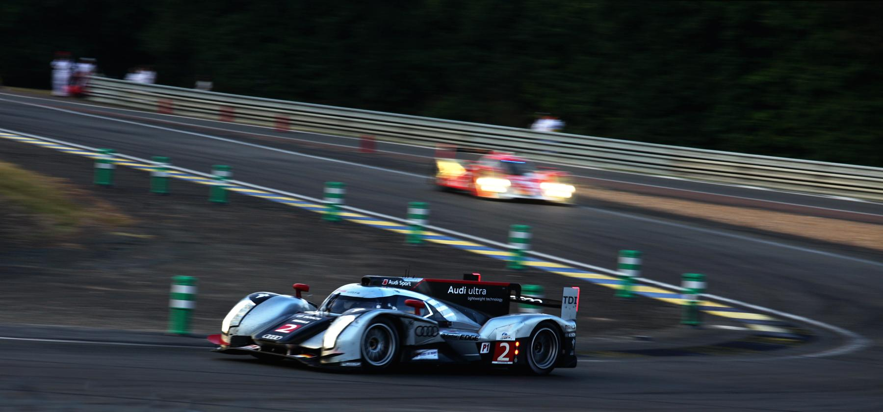 Le Mans 2011 - Race - Audi R18 TDI #2 at Mulsanne.